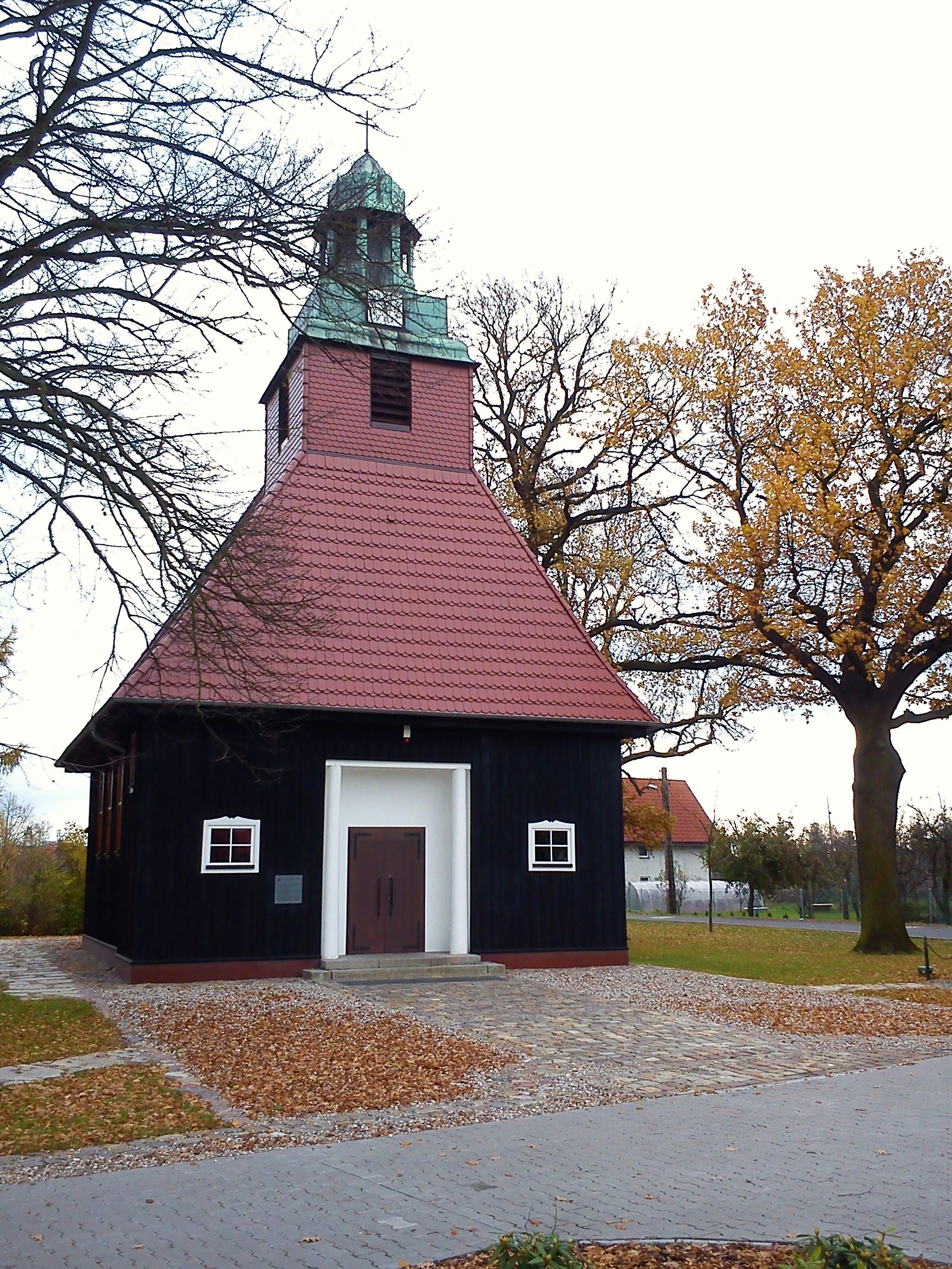 Poznań Krzesiny, ul. Jarosławska 5 - dawny kościół ewangelicki tzw. norweski, obecnie kościół rzymskokatolicki pw. Matki Boskiej Królowej Korony Polskiej (1912)